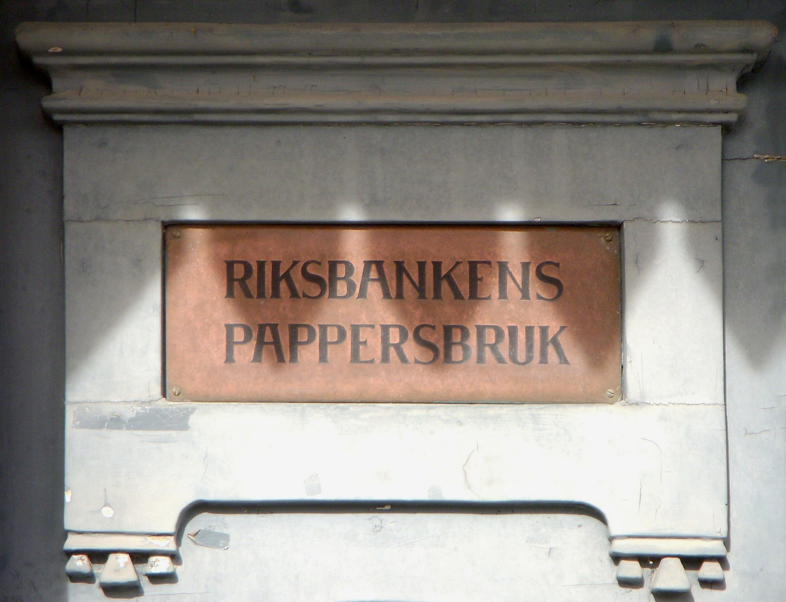 Tumba pappersbruk, skylt